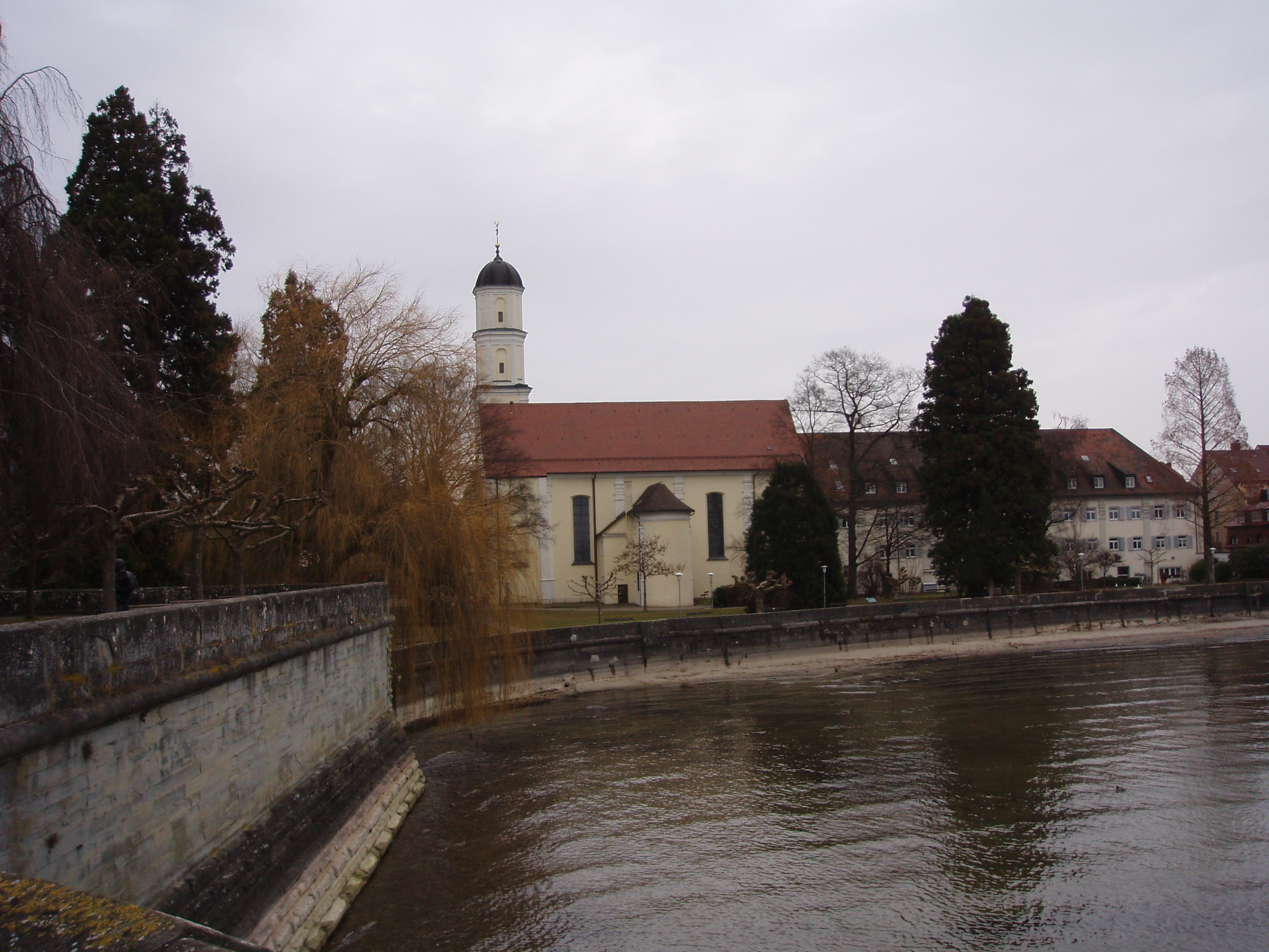 Pfarrkirche St. Martin in Langenargen von Schloss Montfort aus gesehen